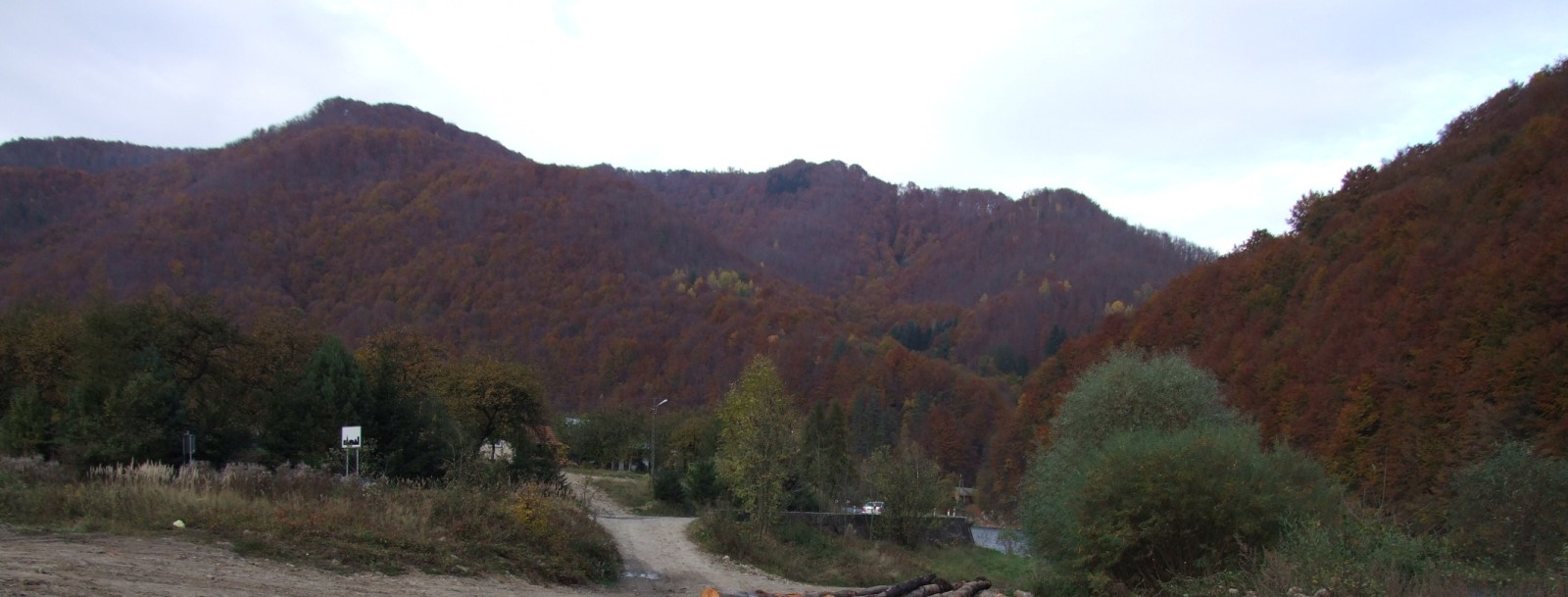 Rezerwat przyrody Kłodne w Tylmanowej w Beskidzie Sądeckim